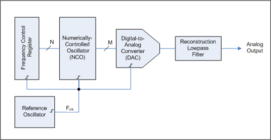 Diagrama de bloques que describe en idioma inglés, las partes que componen a un sintetizador digital directo de frecuencias